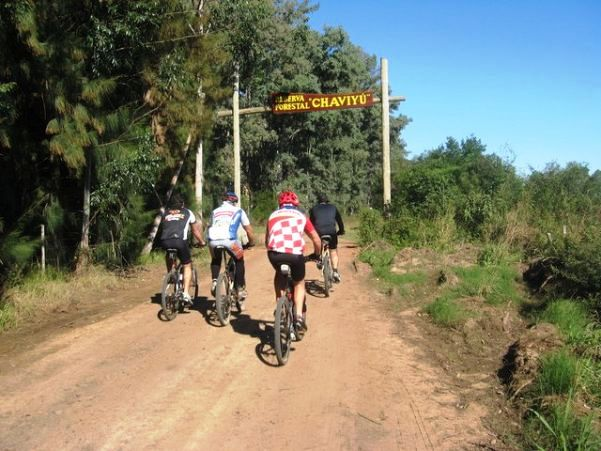 La entrada de la reserva